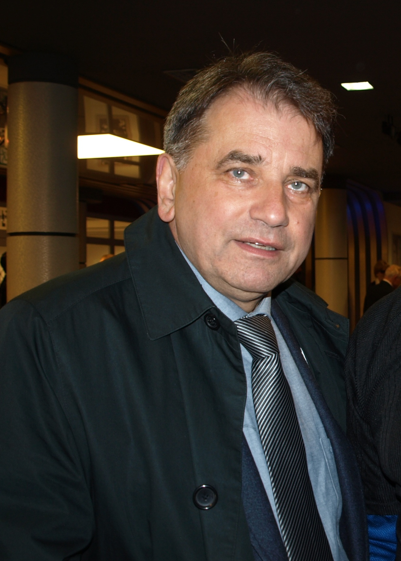 Waldemar Krzystek, reżyser.